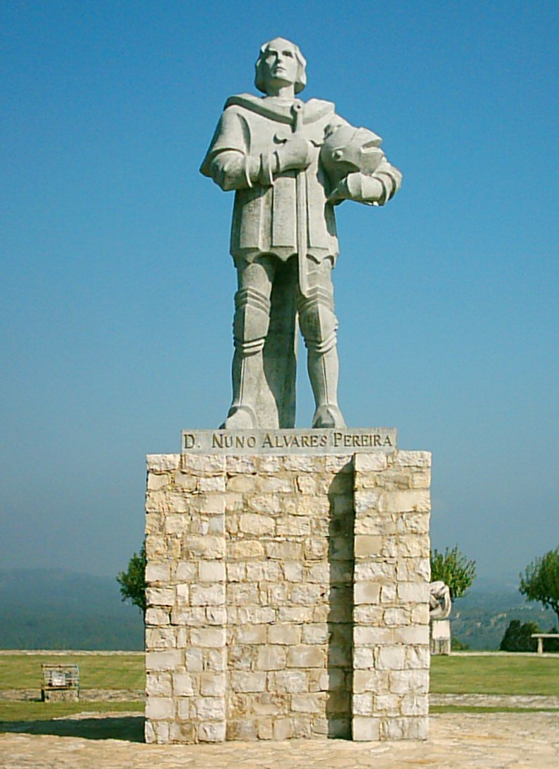 Estátua de Dom Nuno Álvares Pereira frente ao Castelo de Ourém, em Ourém, Portugal.